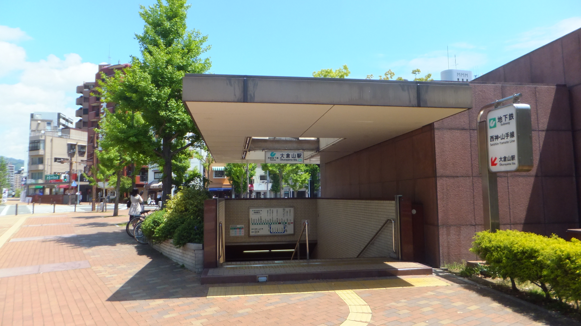 大倉山駅（2014年5月1日）